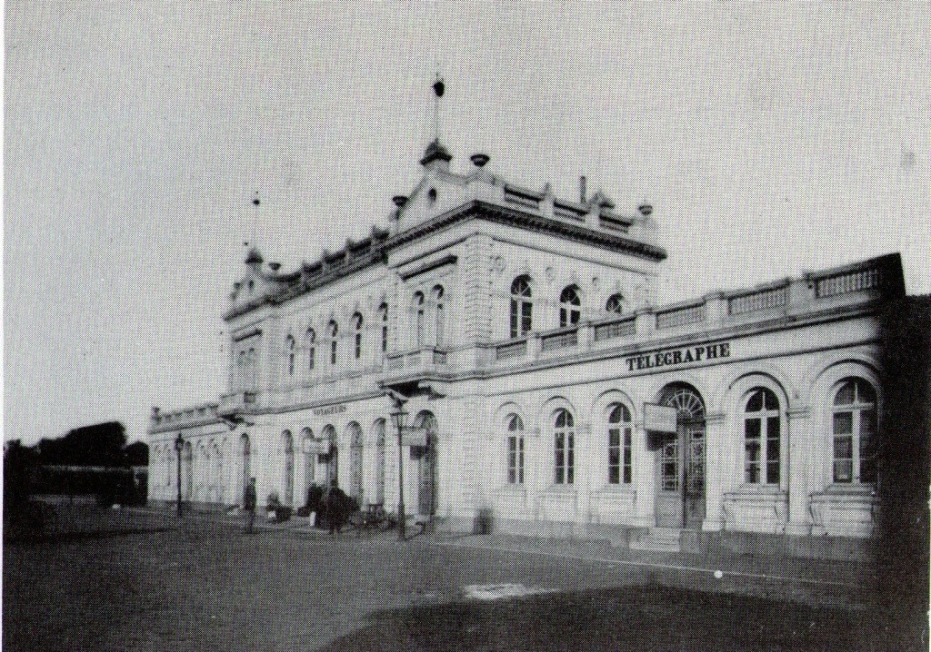 Foto van het oorspronkelijke stationsgebouw van Oostende-Stad, voor de afbraak in 1879